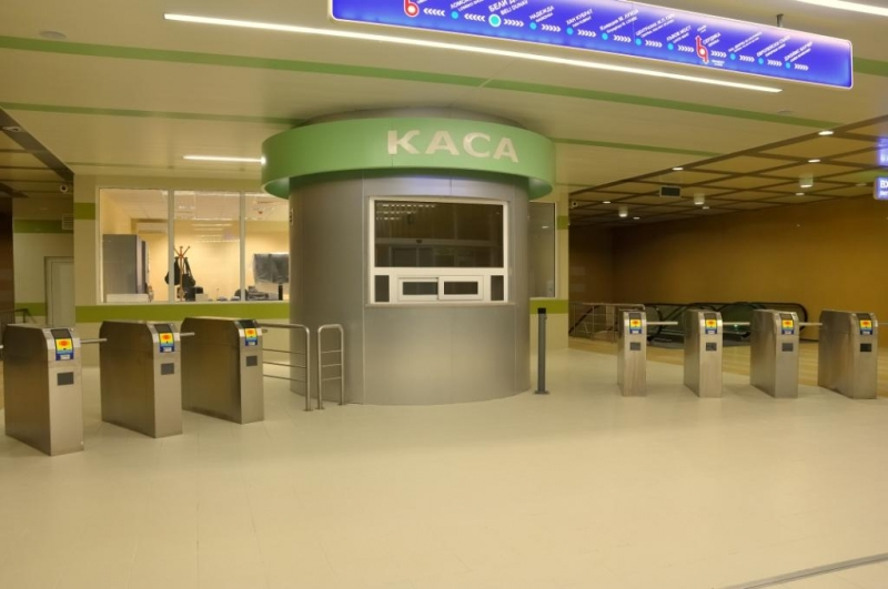 Метростанция Бели Дунав